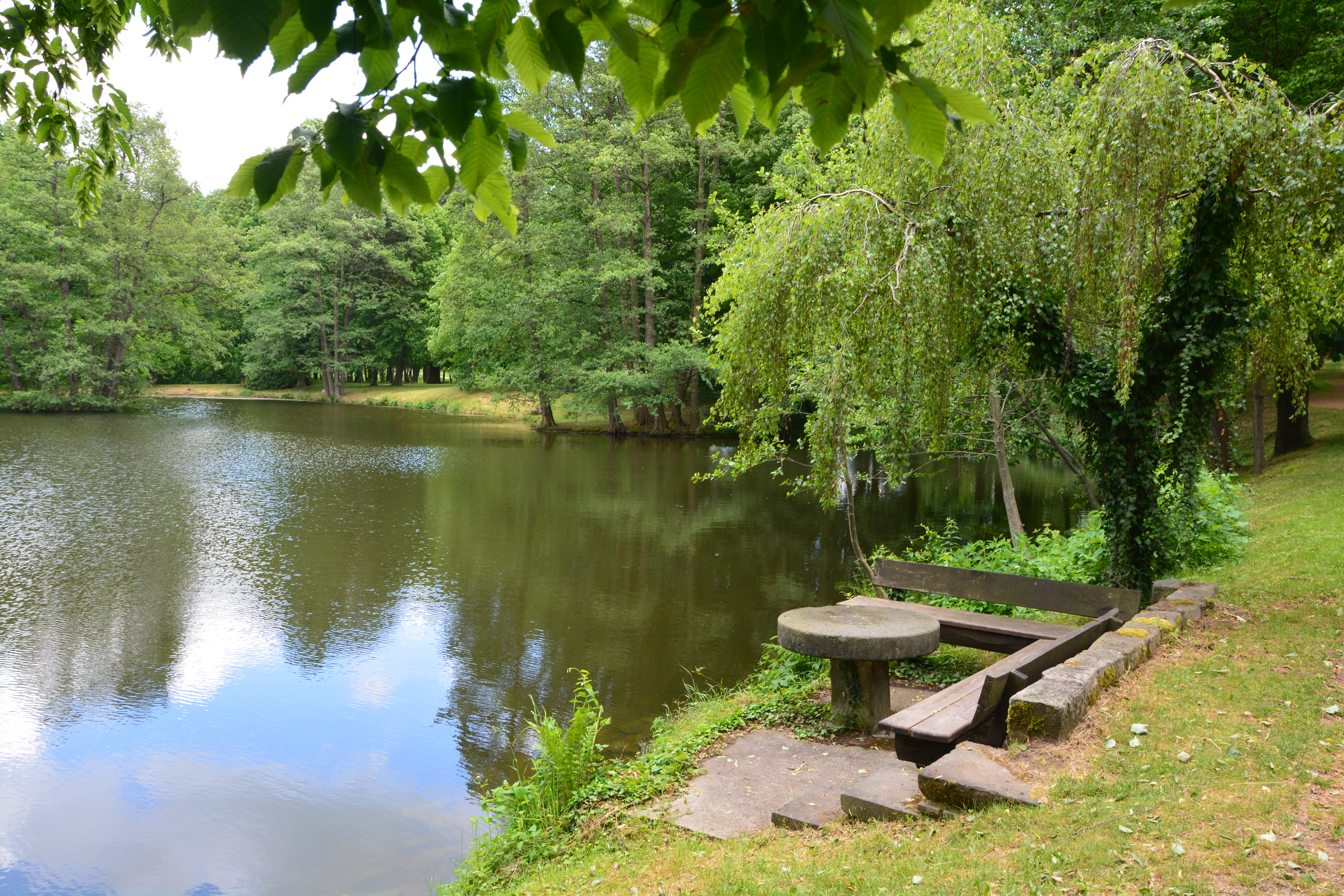 01468 Moritzburg, LSG.-Nr.:d 67, Kleinkuppenlandschaft, Schlosspark 01561 Lauterbach(Ebersbach)